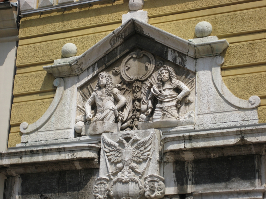 Biste cara Leopolda I. i cara Karla VI. na Gradskom tornju u Rijeci. Croatia